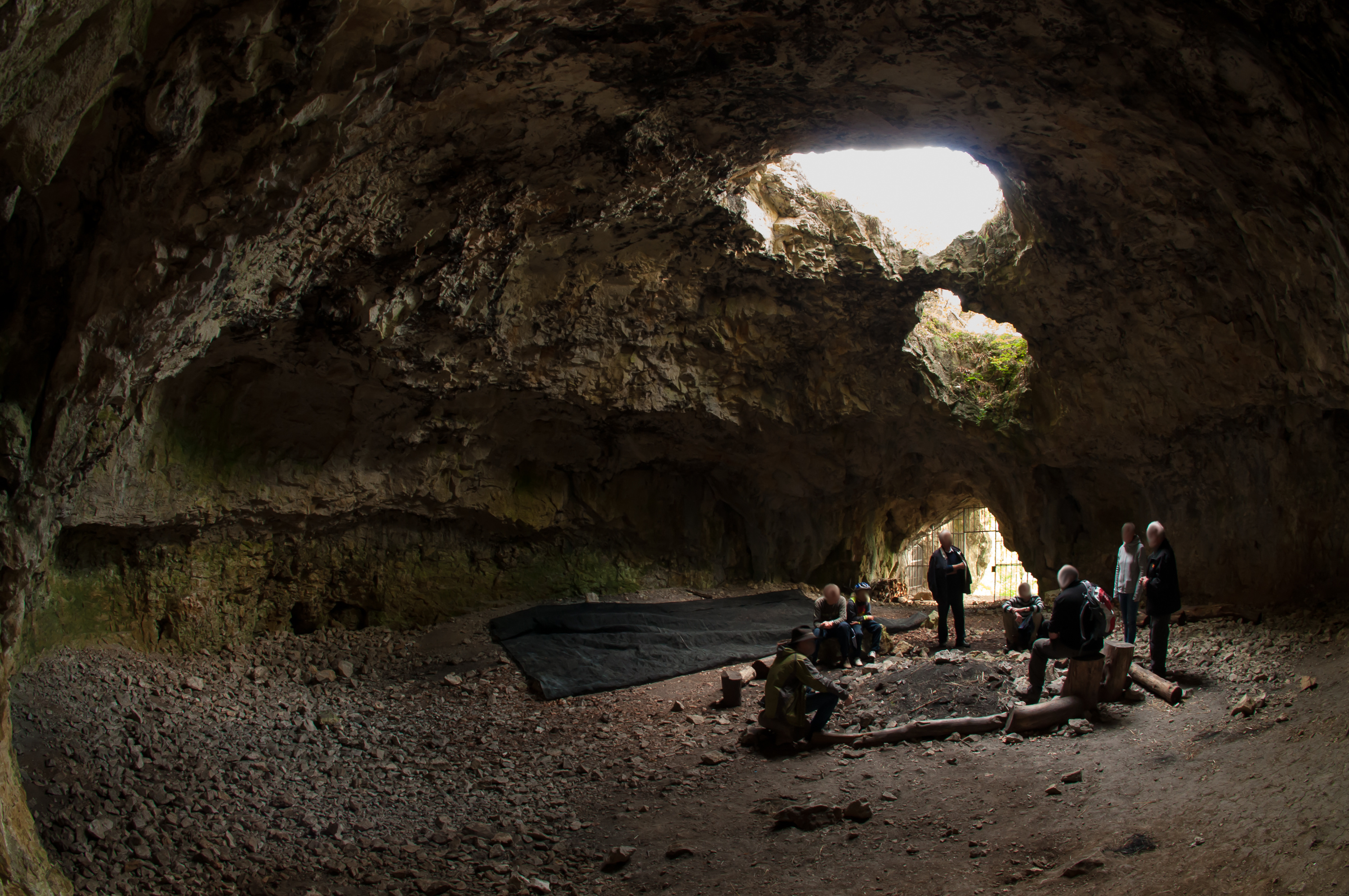 Die Brillenhöhle bei Blaubeuren.